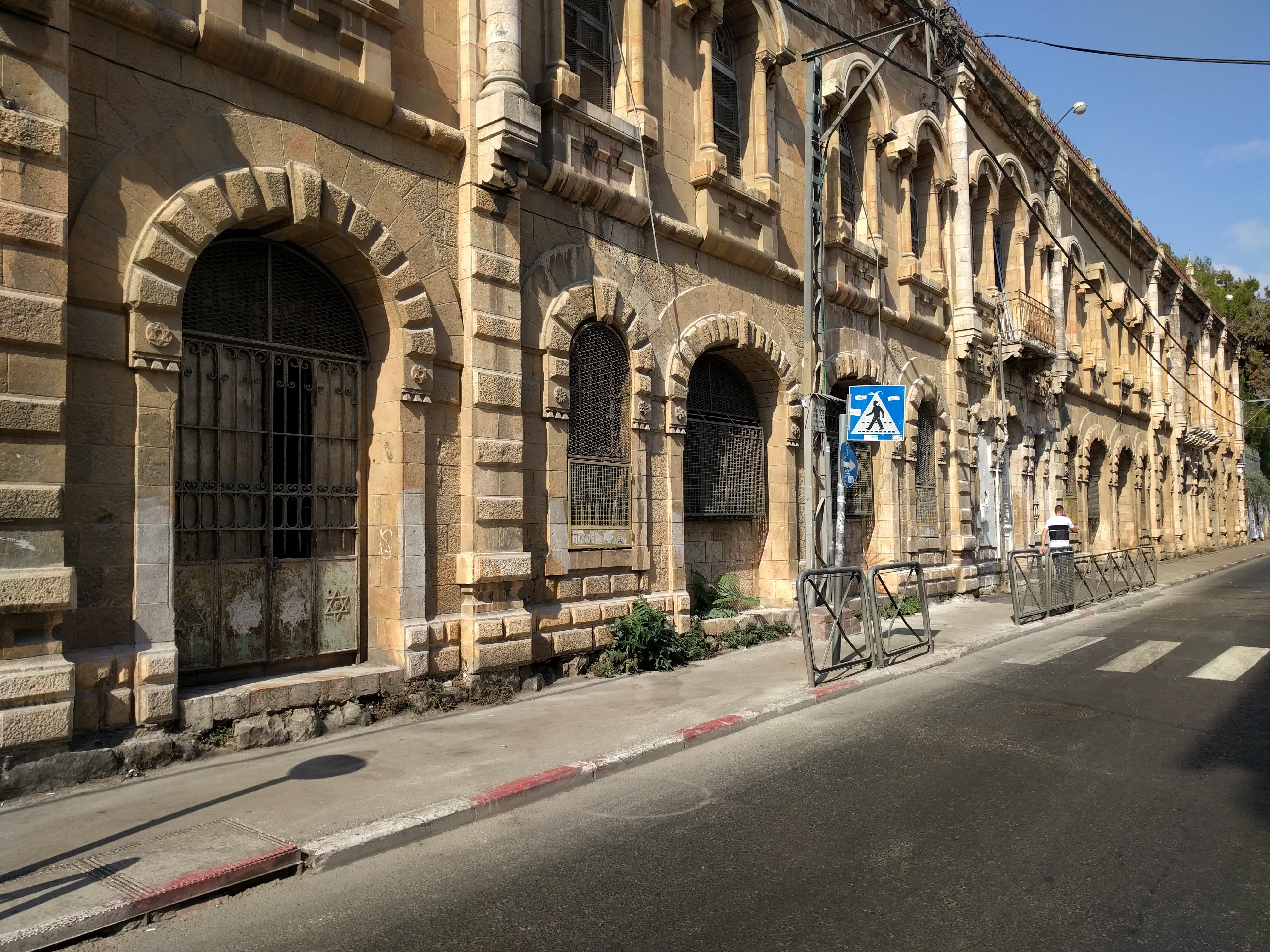 חזית המבנה שבו היה בית הספר שפיצר